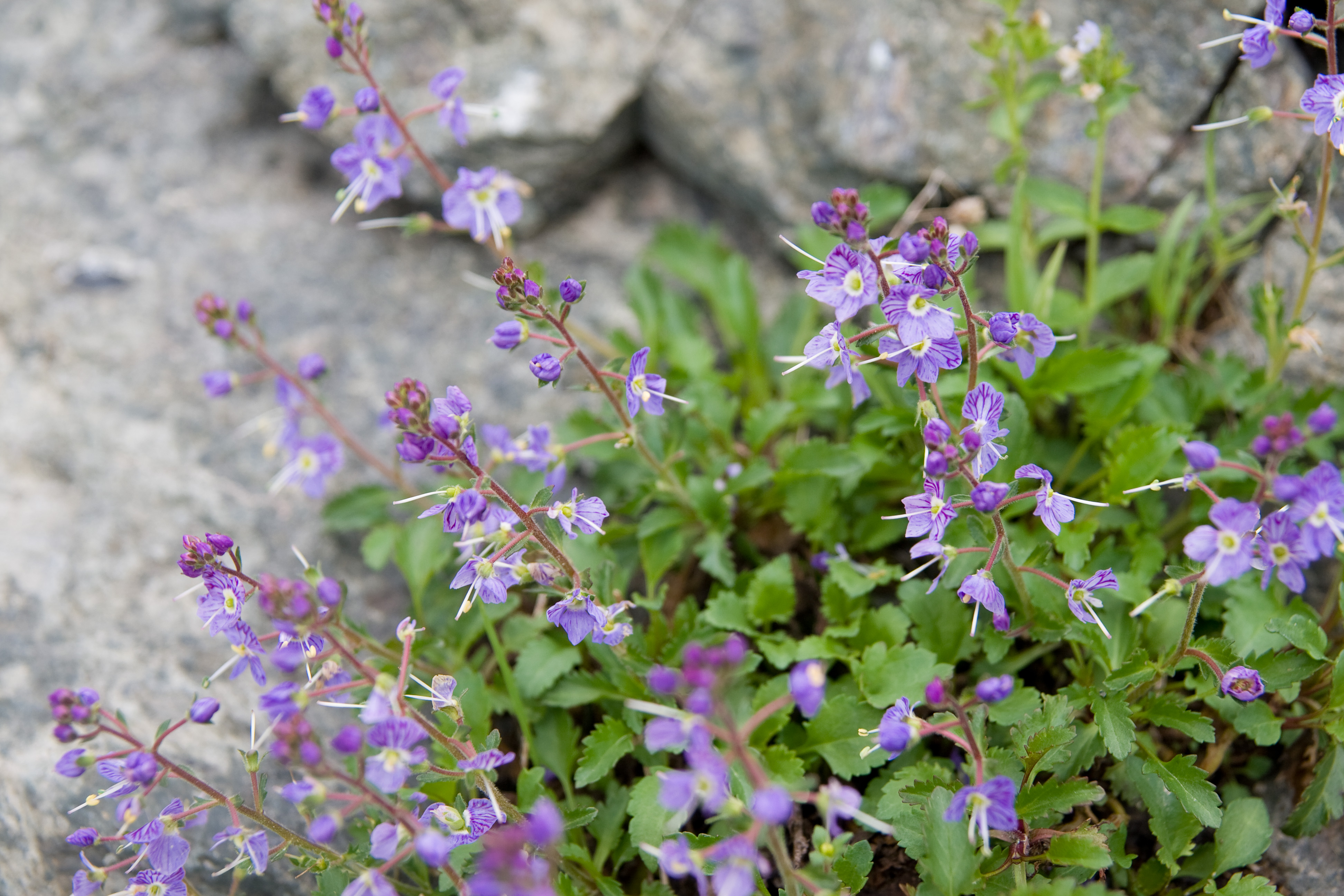 ミヤマクワガタ (学名：Veronica schmidtiana ssp. senanense)